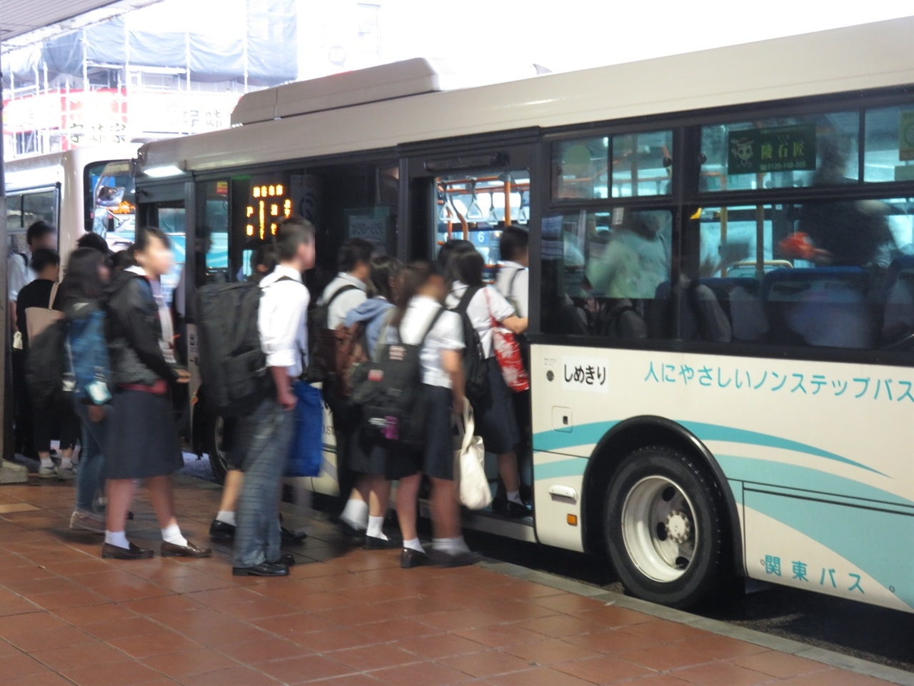 朝ラッシュ時間帯のJR宇都宮駅始発の路線で、通常はしめきりとなっている中扉を開放している場面。